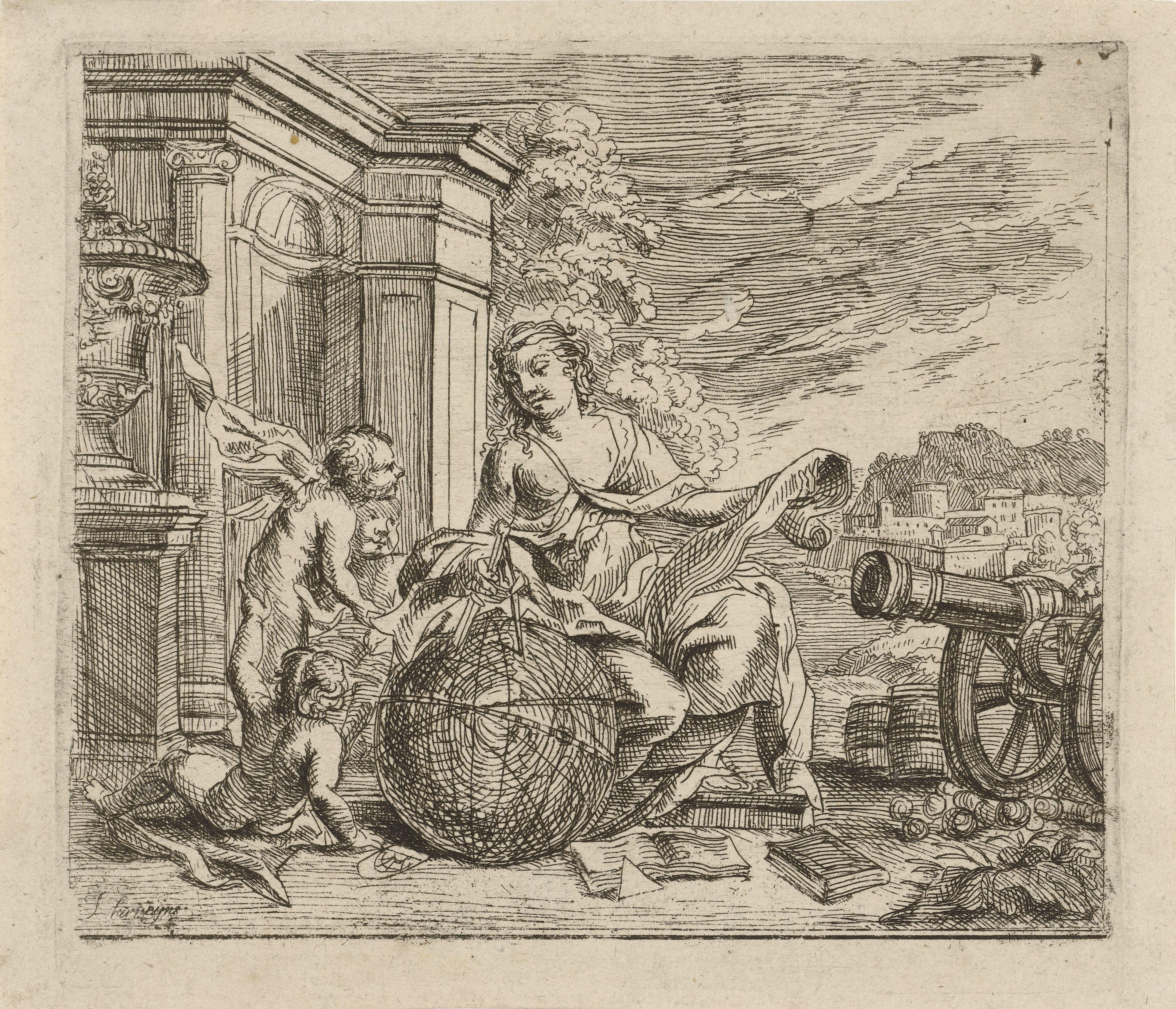 IdentificatieTitel(s): Allegorie op de geometrieObjecttype: prent Objectnummer: RP-P-OB-55.388Catalogusreferentie: Hollstein Dutch 4Opschriften / Merken: verzamelaarsmerk, verso linksonder, gestempeld: Lugt 2165verzamelaarsmerk, verso rechtsonder, gestempeld: Lugt 514Omschrijving: Allegorische voorstelling van een vrouw als personifictaie van de geometrie in klassiek gewaad zittend bij de planeet Saturnus met een passer in haar hand. Rechts van haar een kanon en links van haar drie putti. Op de achtergrond een stad.VervaardigingVervaardiger: prentmaker: Jacob Herreyns (I) (vermeld op object)Plaats vervaardiging: AntwerpenDatering: 1671 - 1732Fysieke kenmerken: etsMateriaal: papier Techniek: etsenAfmetingen: plaatrand: h 128 mm × b 143 mmOnderwerpWat: 'Geometria' (~ quadrivium); 'Geometria' (Ripa)Verwerving en rechtenVerwerving: onbekendCopyright: Publiek domein